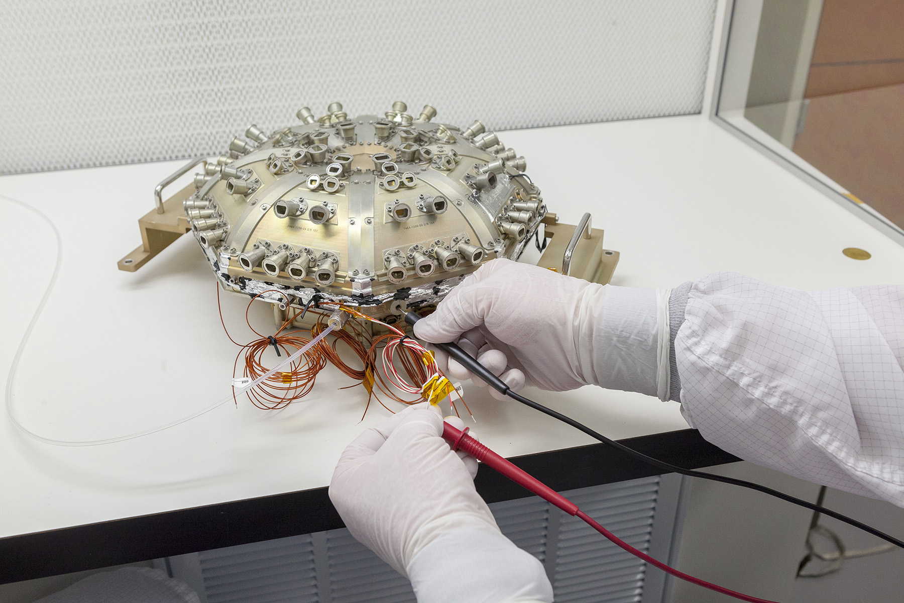 An APL technician prepares the Energetic Particle Instrument-Low Energy (EPI-Lo) for installation on NASA’s Solar Probe Plus spacecraft.